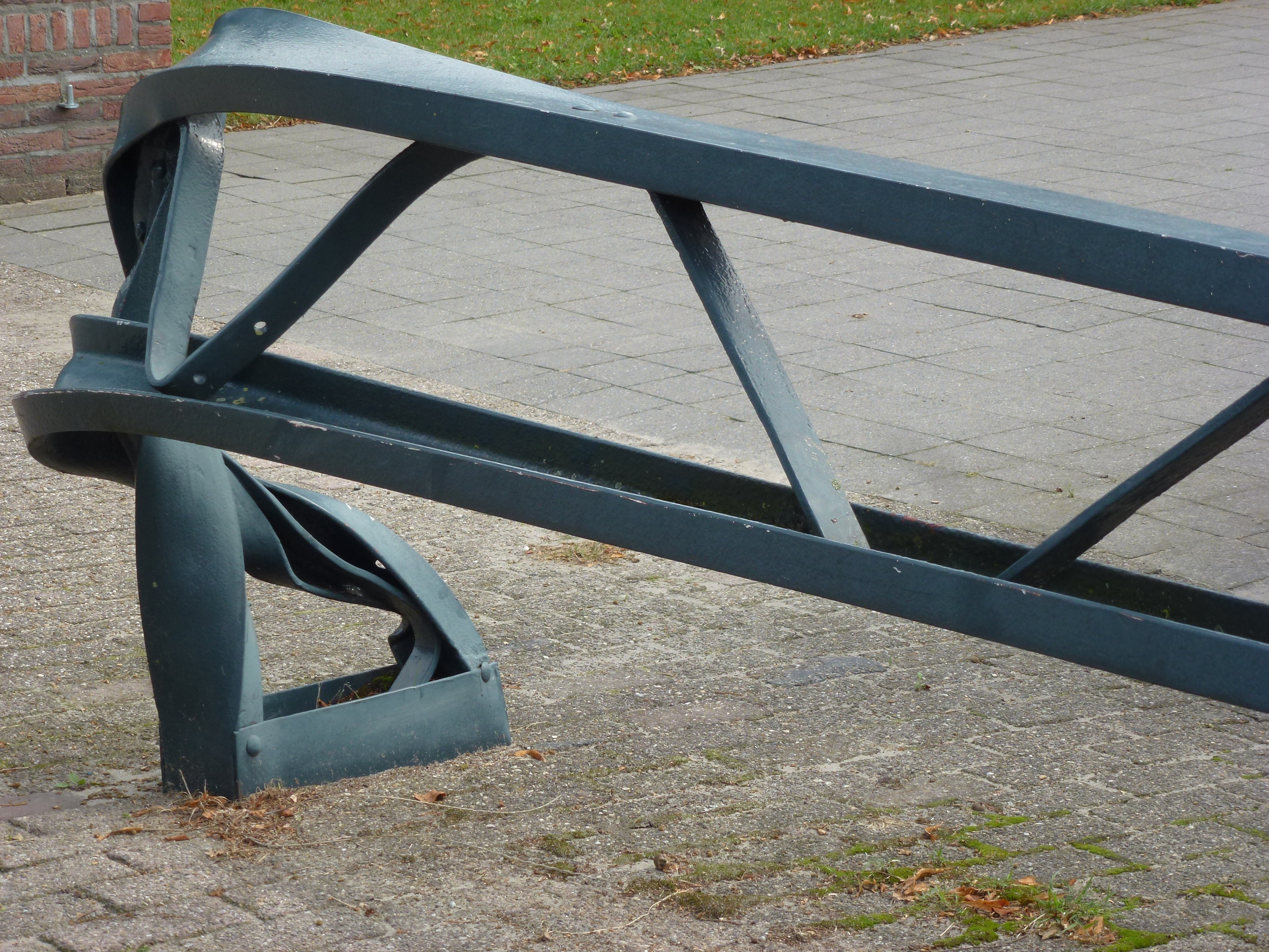 Landerd, 't Oventje, geknakte lantaarnpaal, stormramp aug 1925 (detail 2)